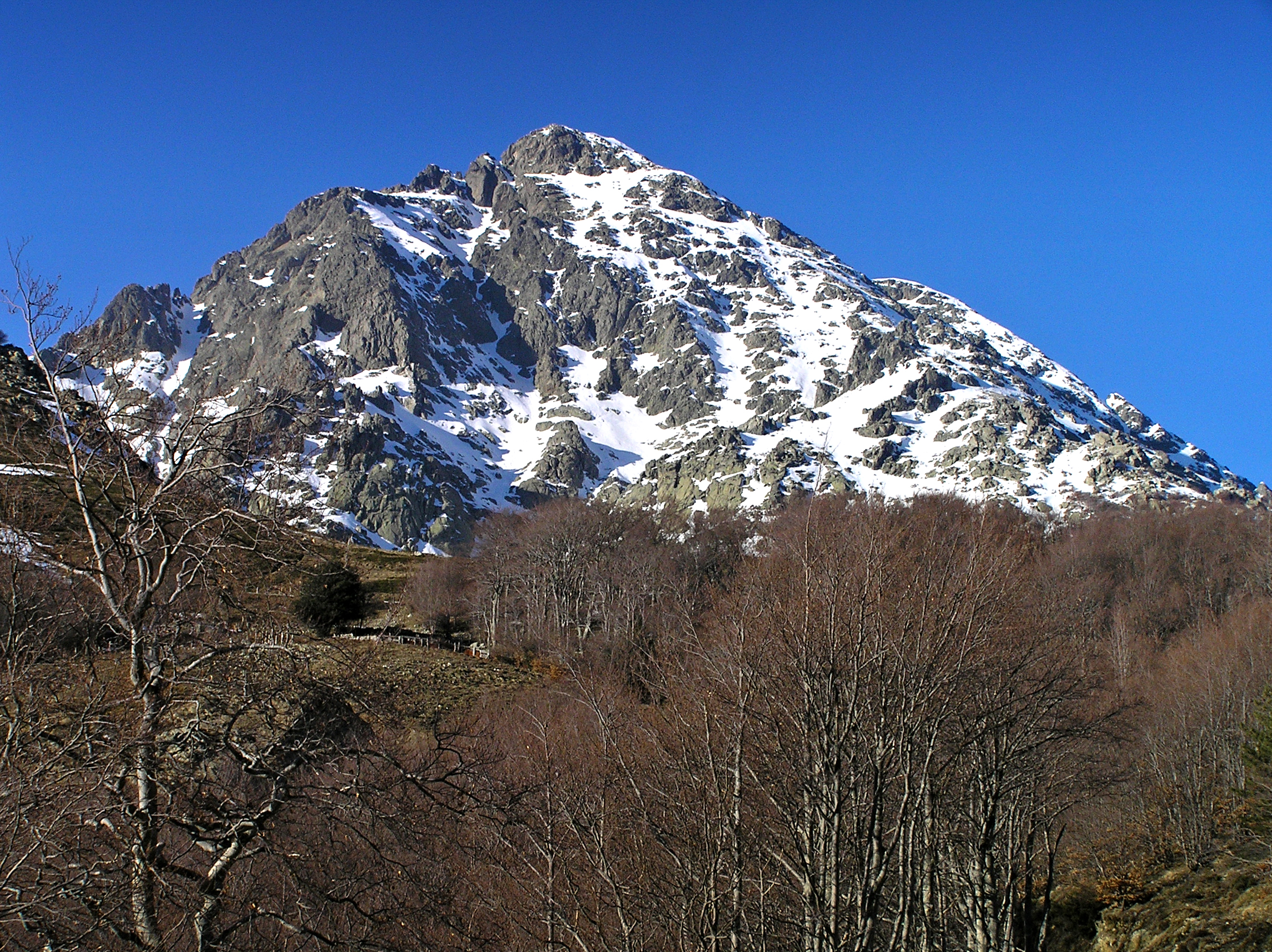 Bocognano (Corse) - Le Monte d'Oro (2389 m) vu depuis la montée au col de Vizzavona